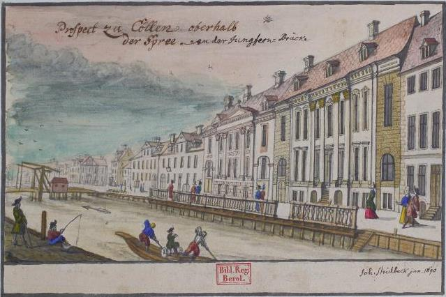 Prospect zu Cöllen oberhalb der Spree an der Jungfern-Brücke